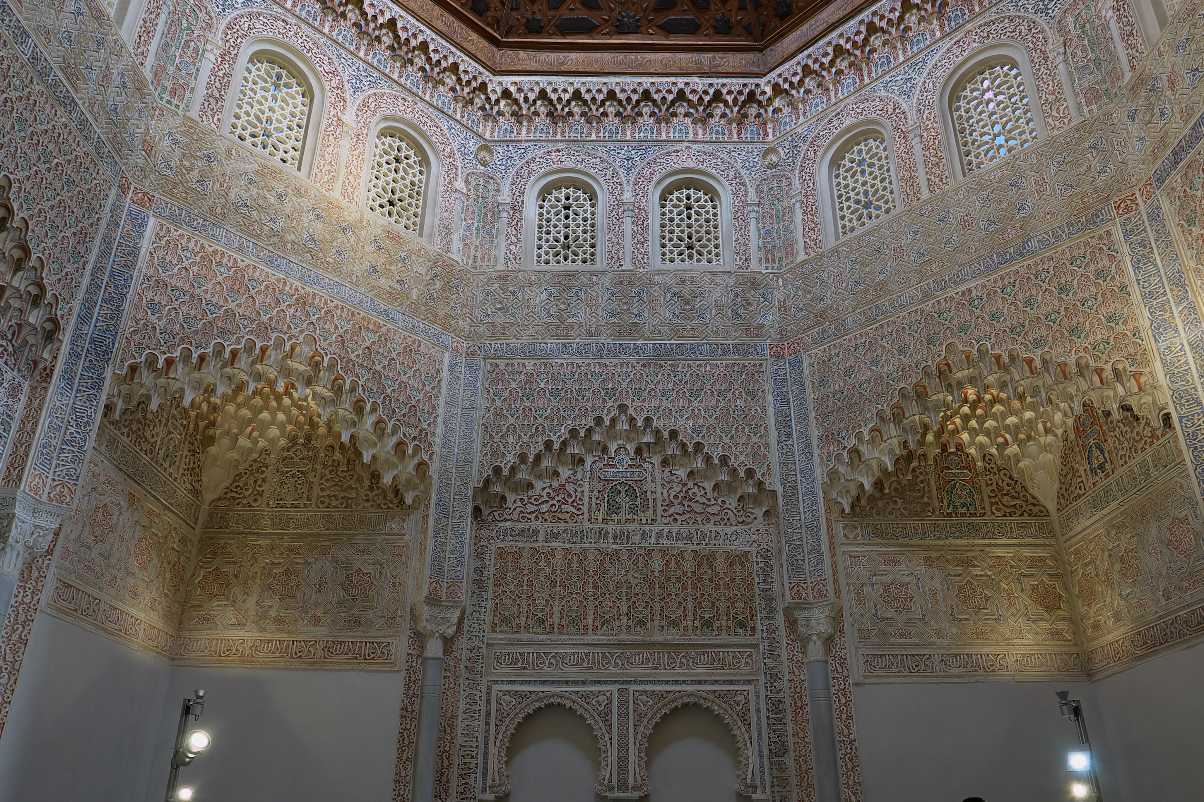 Interior del oratorio de la madrasa nasriyya (1349).